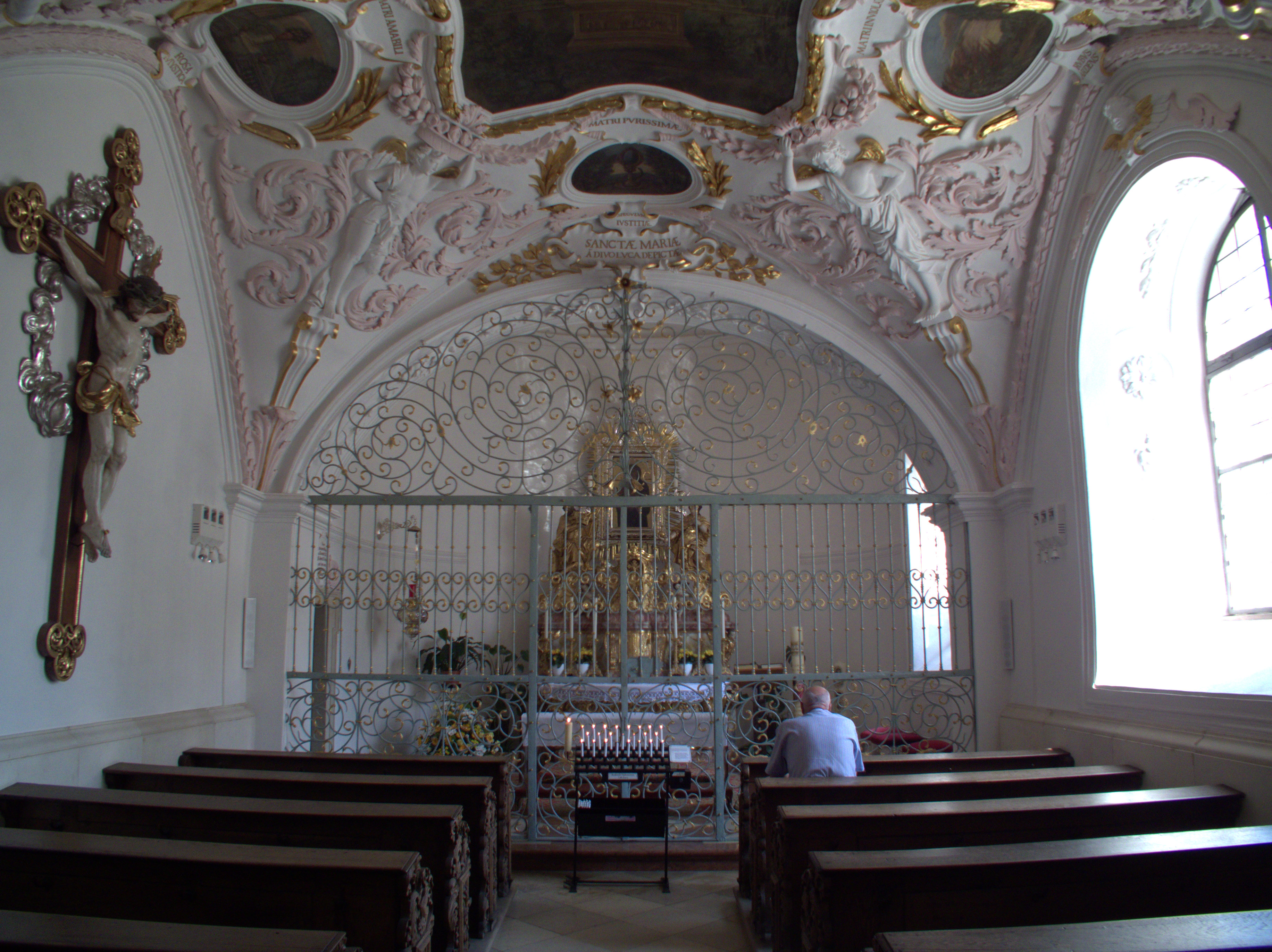 Alte Kapelle Regensburg - Gnadenkapelle